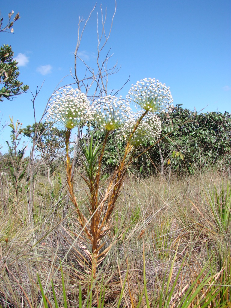 Paepalanthus speciosus - ERIOCAULACEAE - Jardim Bot�nico de Bras�lia - DF - Brasil